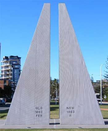 Le monument à la frontière entre Queensland et Nouvelle Galles du sud